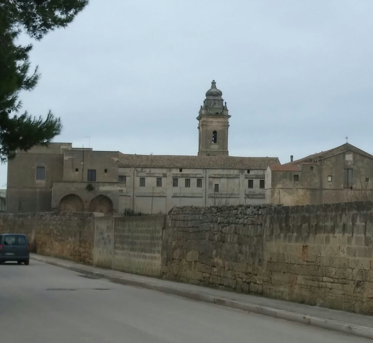 Santuario di Maria Santissima della Croce.